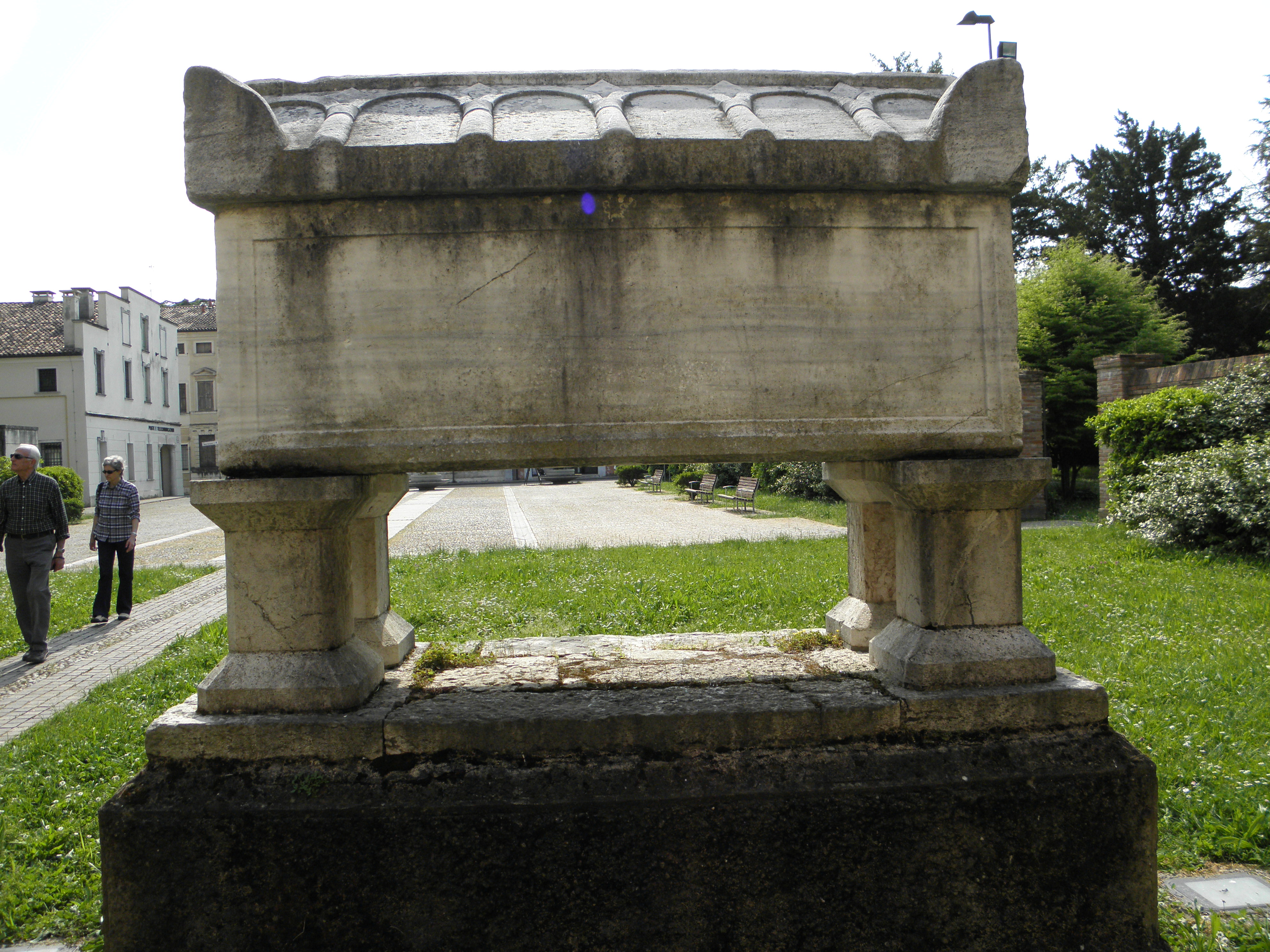 Badia Polesine: il sarcofago che conteneva i resti di Alberto Azzo II d'Este situato nel piazzale antistante l'Abbazia della Vangadizza.